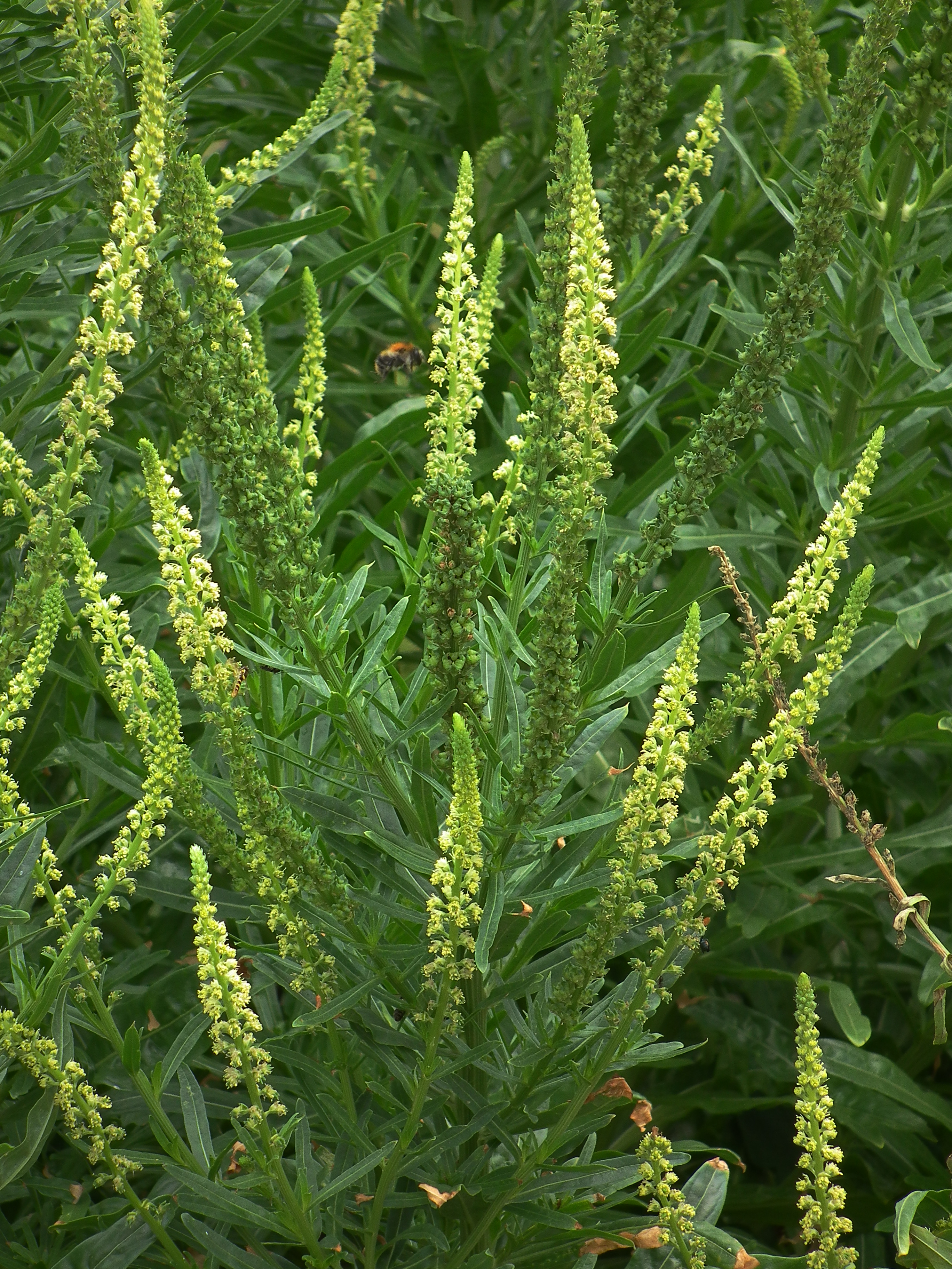 Färber-Wau (Reseda luteola) am Rand eines Feldes in Heidelberg (Baden-Württemberg, Deutschland), Höhe circa 1,50 Meter